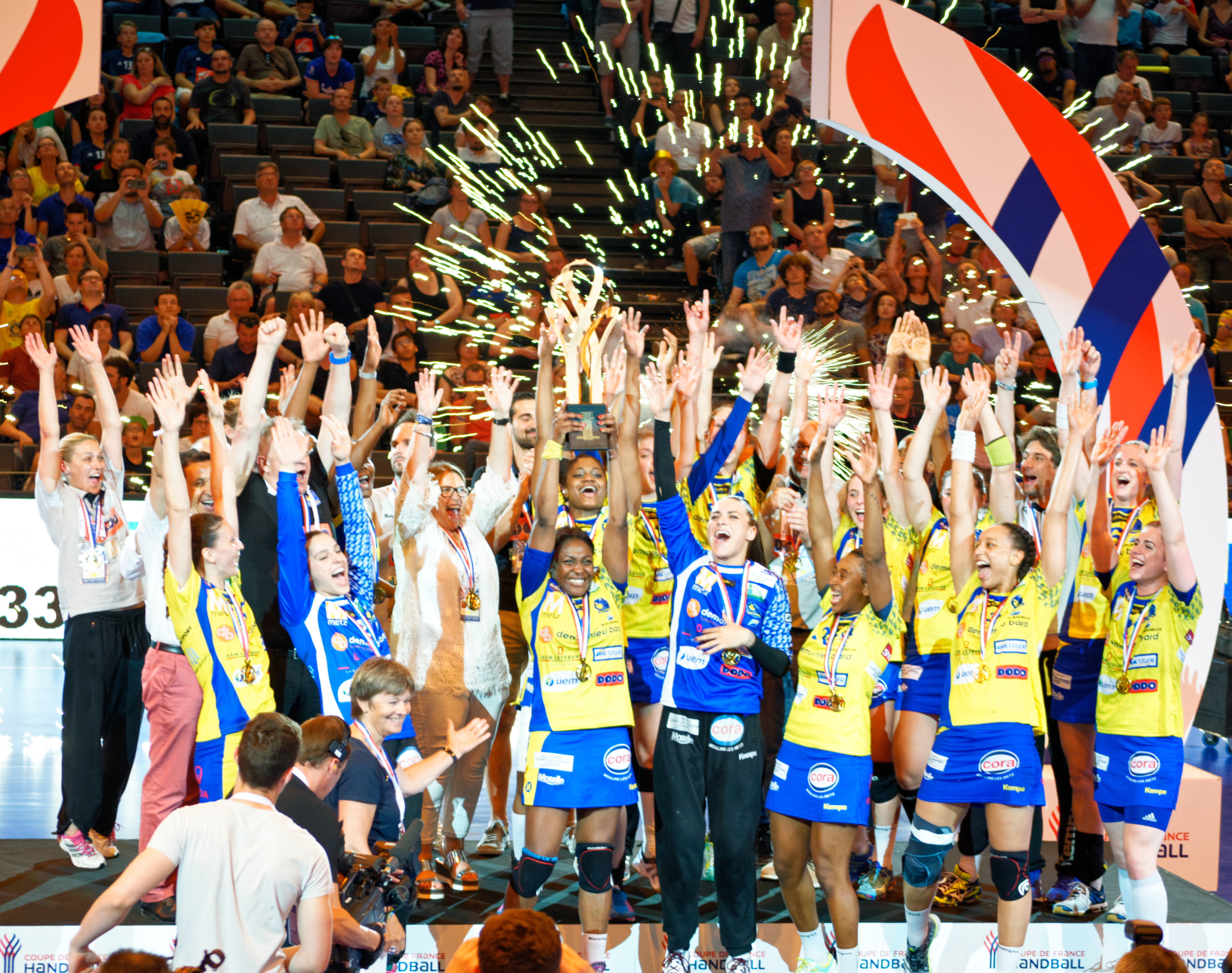 Metz, vainqueur de la Coupe de France de handball face à Issy PAris Hand. A Bercy, le 27 mai 2017.